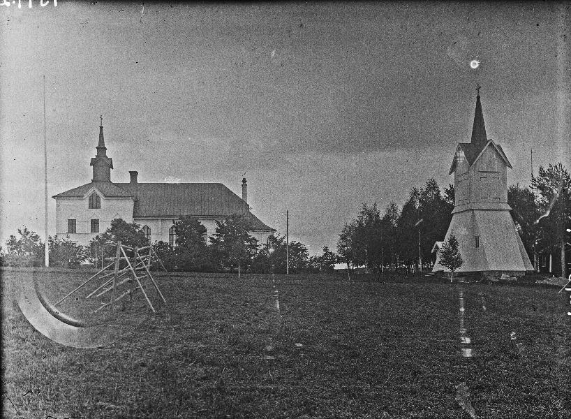 Kyrkan från söder. Snabbinv.; (01) Exteriörer; Byggnadsverk; Religionsutövning - kyrkor